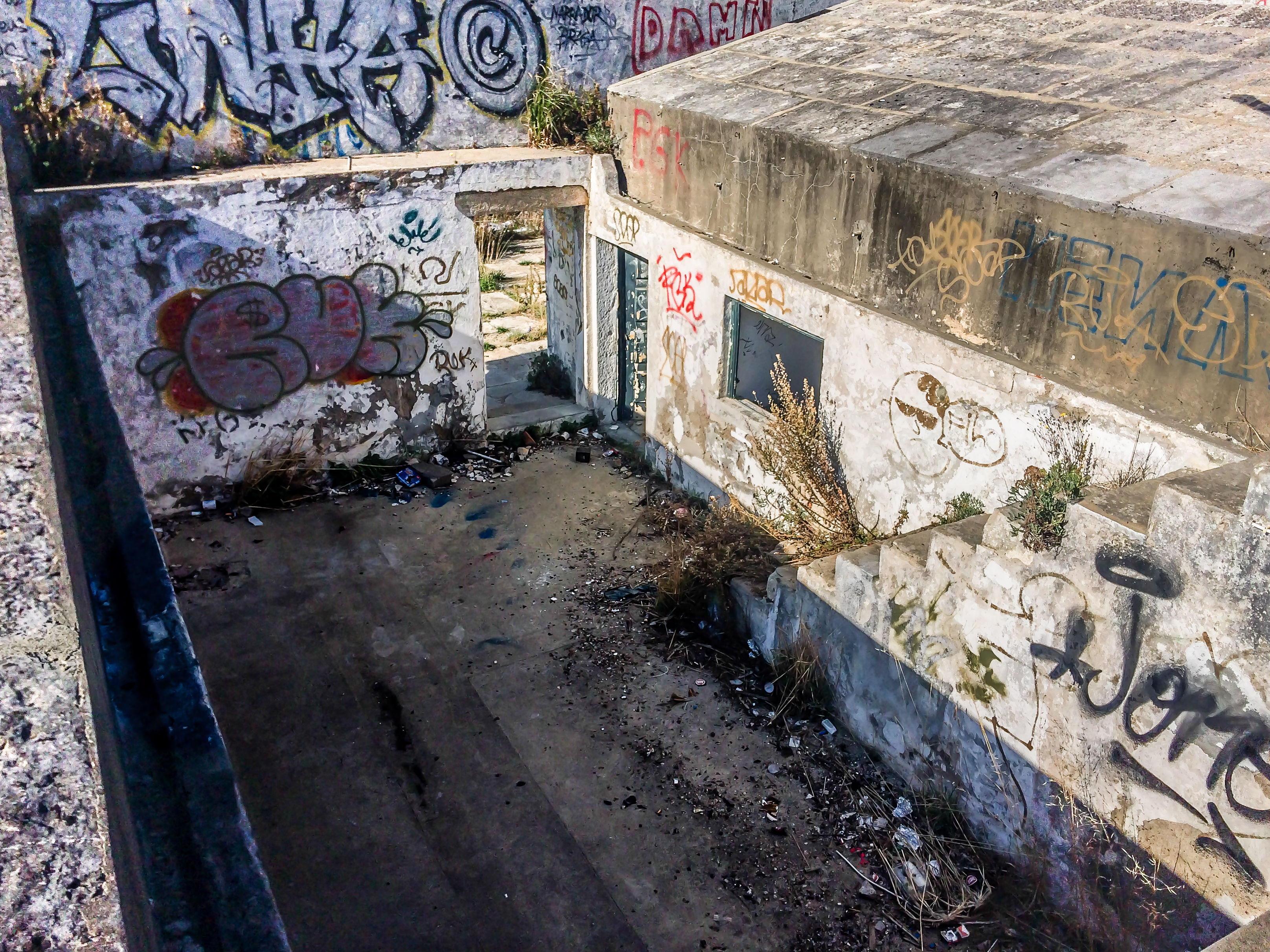 Vista do interior do forte.